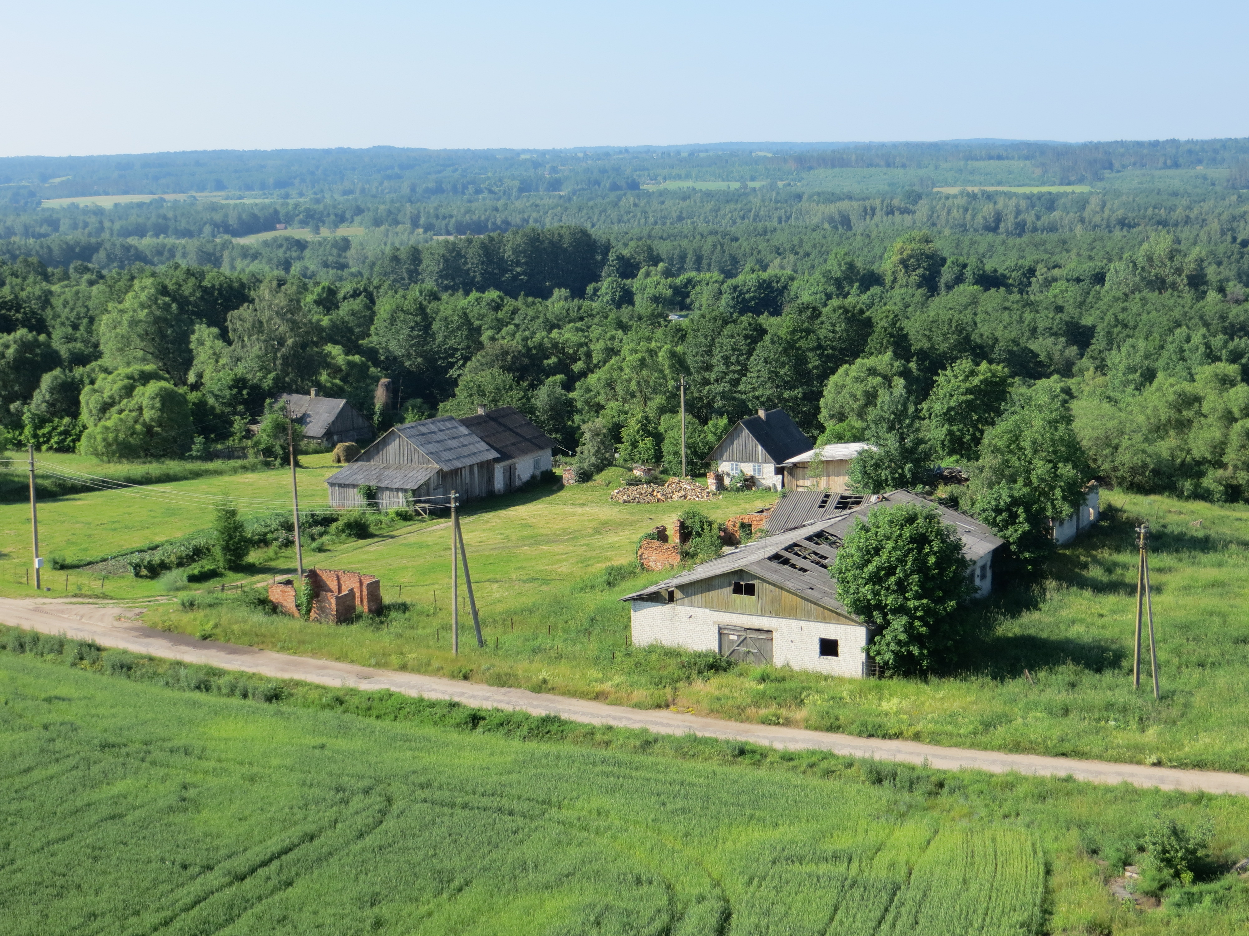 Kvietkinė 59400, Lithuania